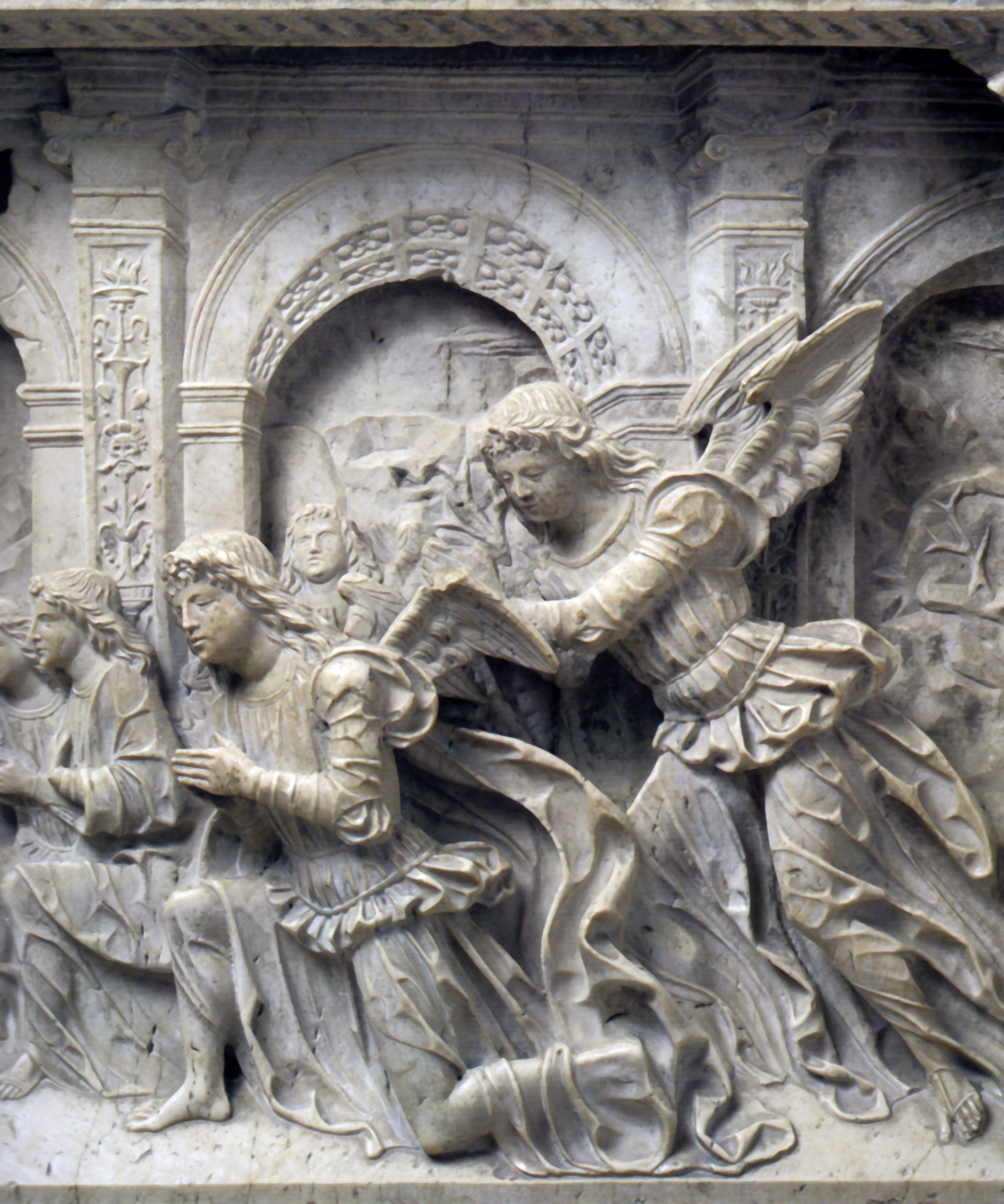 Adorazione Caprioli, Gasparo Cairano, 1495-1500, chiesa di San Francesco d'Assisi, Brescia (dettaglio)